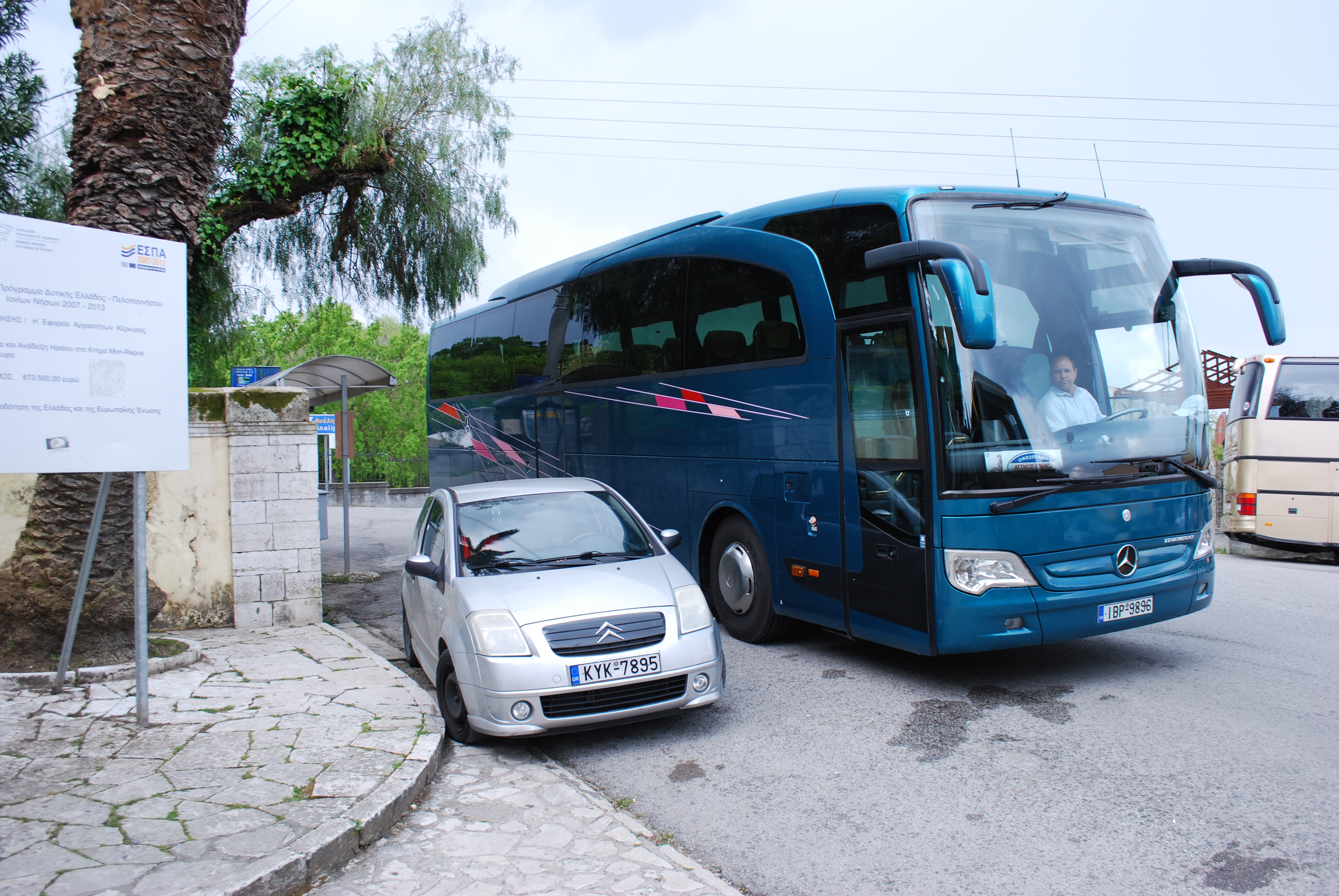 Vue du site archéologique de Paleopoli à Corfou.